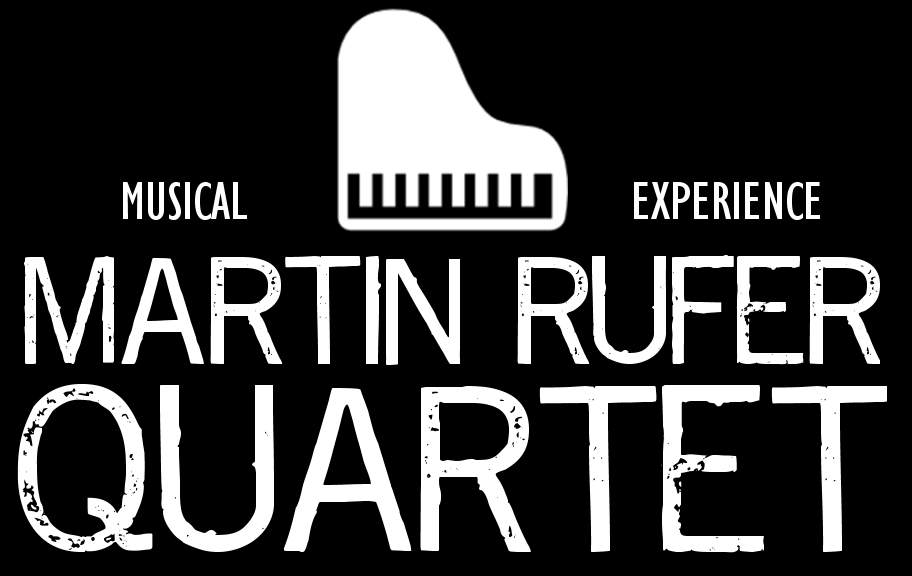 Oficiální logo skupiny Martin Rufer Quartet